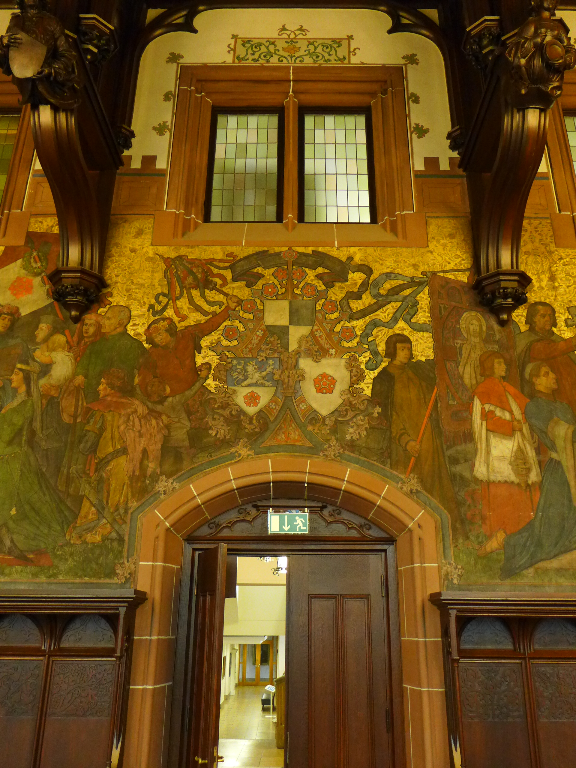 Rathaus St. Johann, Festsaal, Gemäldeausschnitt "Wappenschilde"